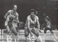 Immagine rilasciata dal proprietario della stessa, pallacanestro Varese